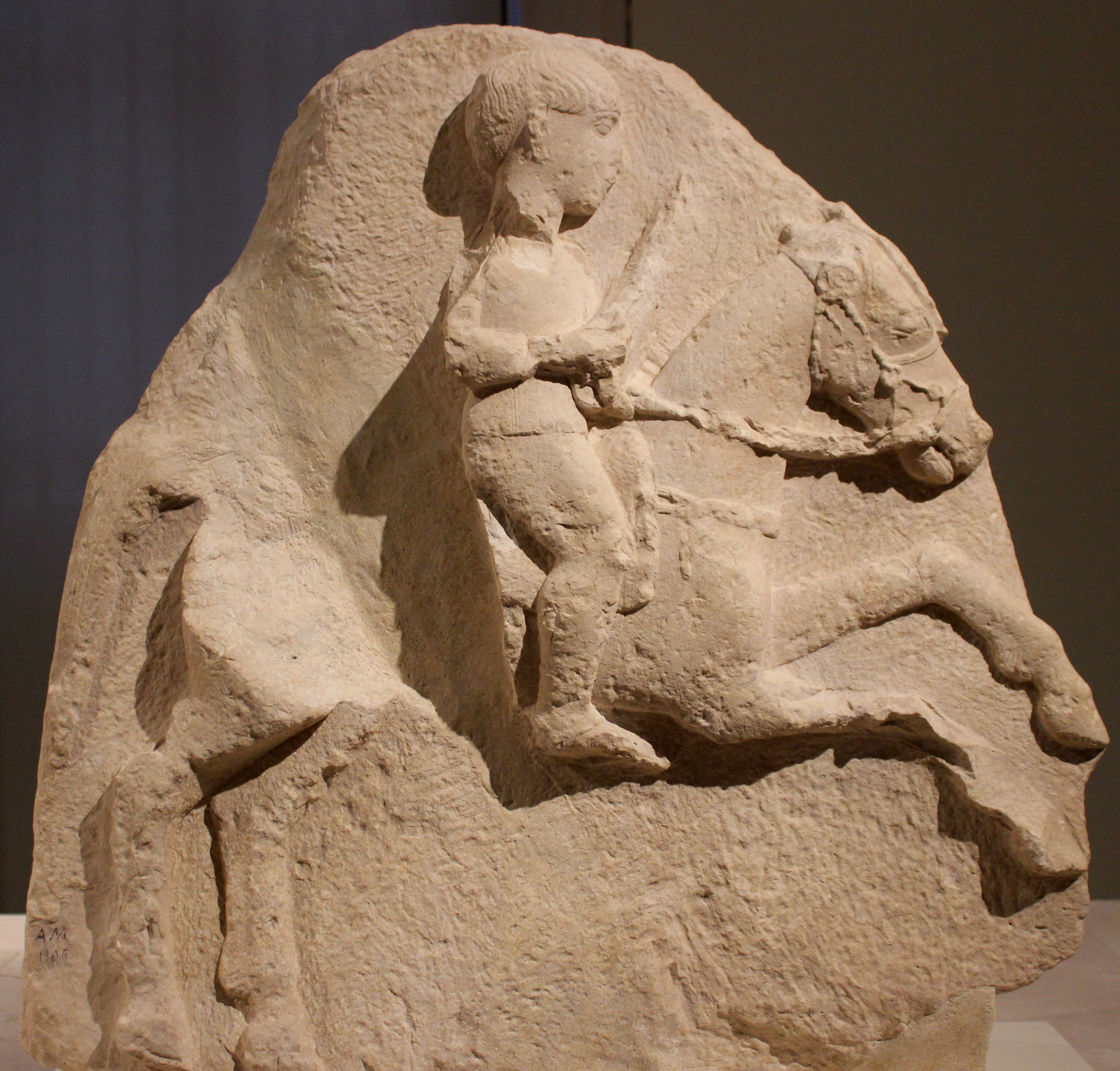 Relieves del monumento A de Osuna